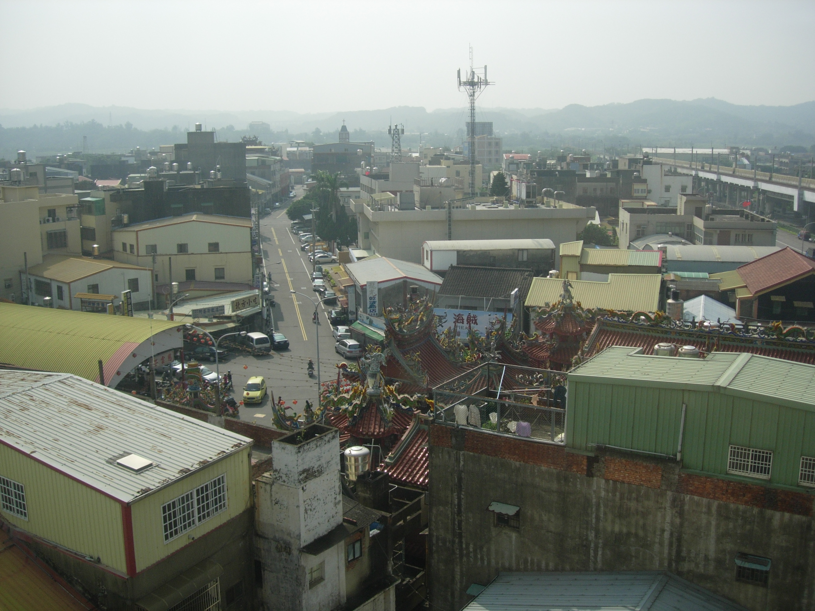 中文（台灣）: 後龍街道一景